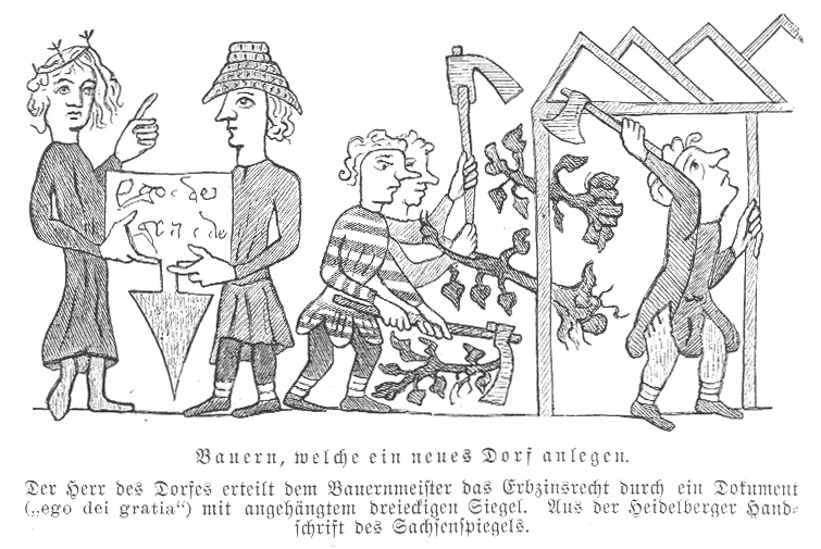 Dorfgründung durch einen Lokator während der Deutschen Ostsiedlung (Zeichnung nach einer Bildszene aus dem Heidelberger Sachsenspiegel, frühes 14. Jahrhundert)